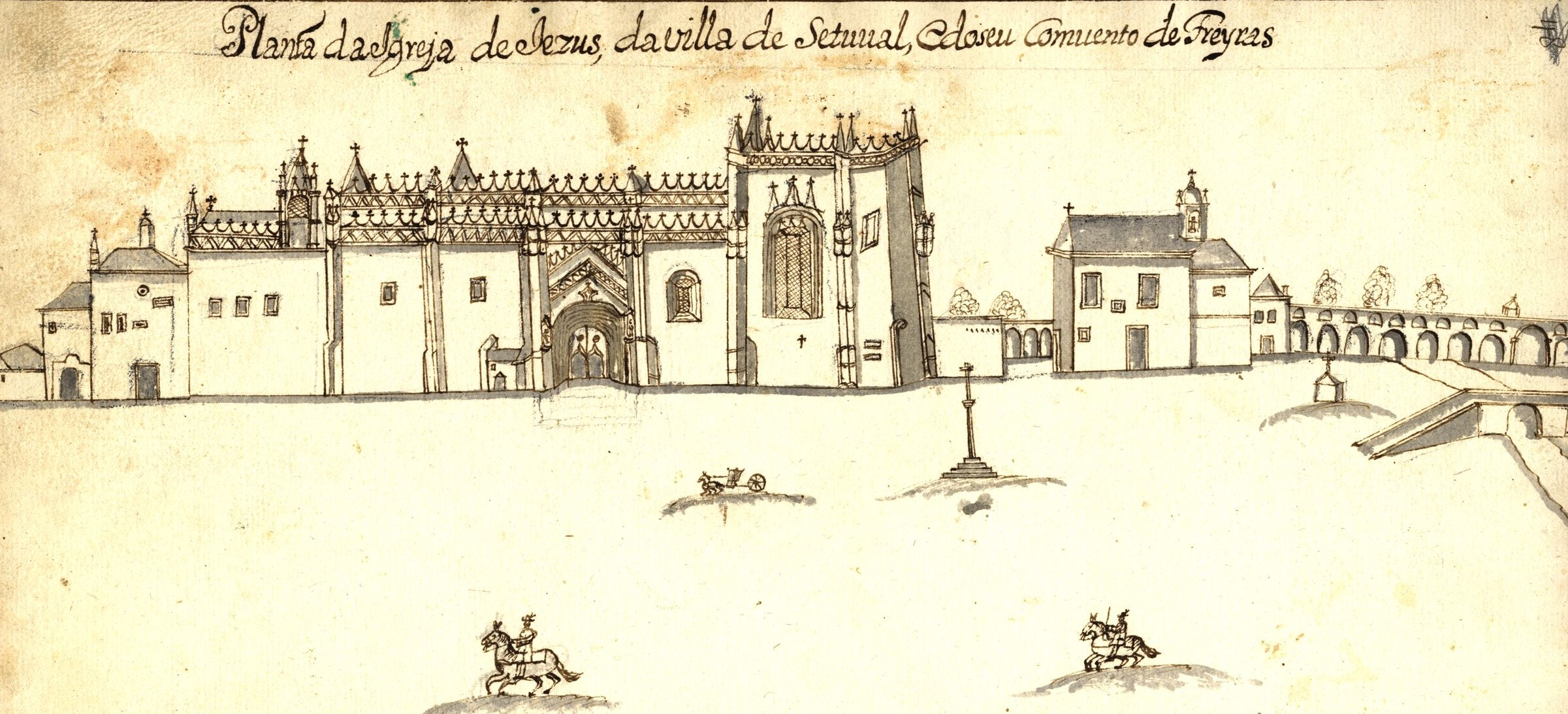 Desenho do Convento de Jesus de Setúbal por João Tomás Correia durante o século XVIII mas antes do Terramoto de 1755.